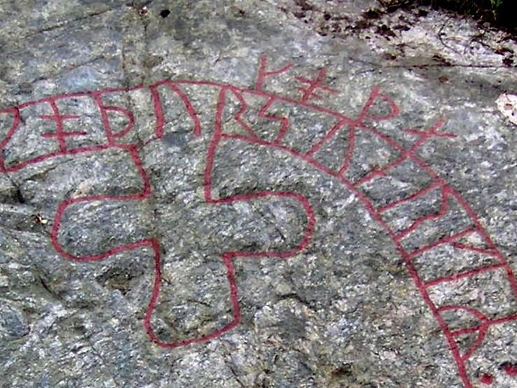 Huddinge kommun, runsten nr Sö 300, Glömstahällen, detalj.